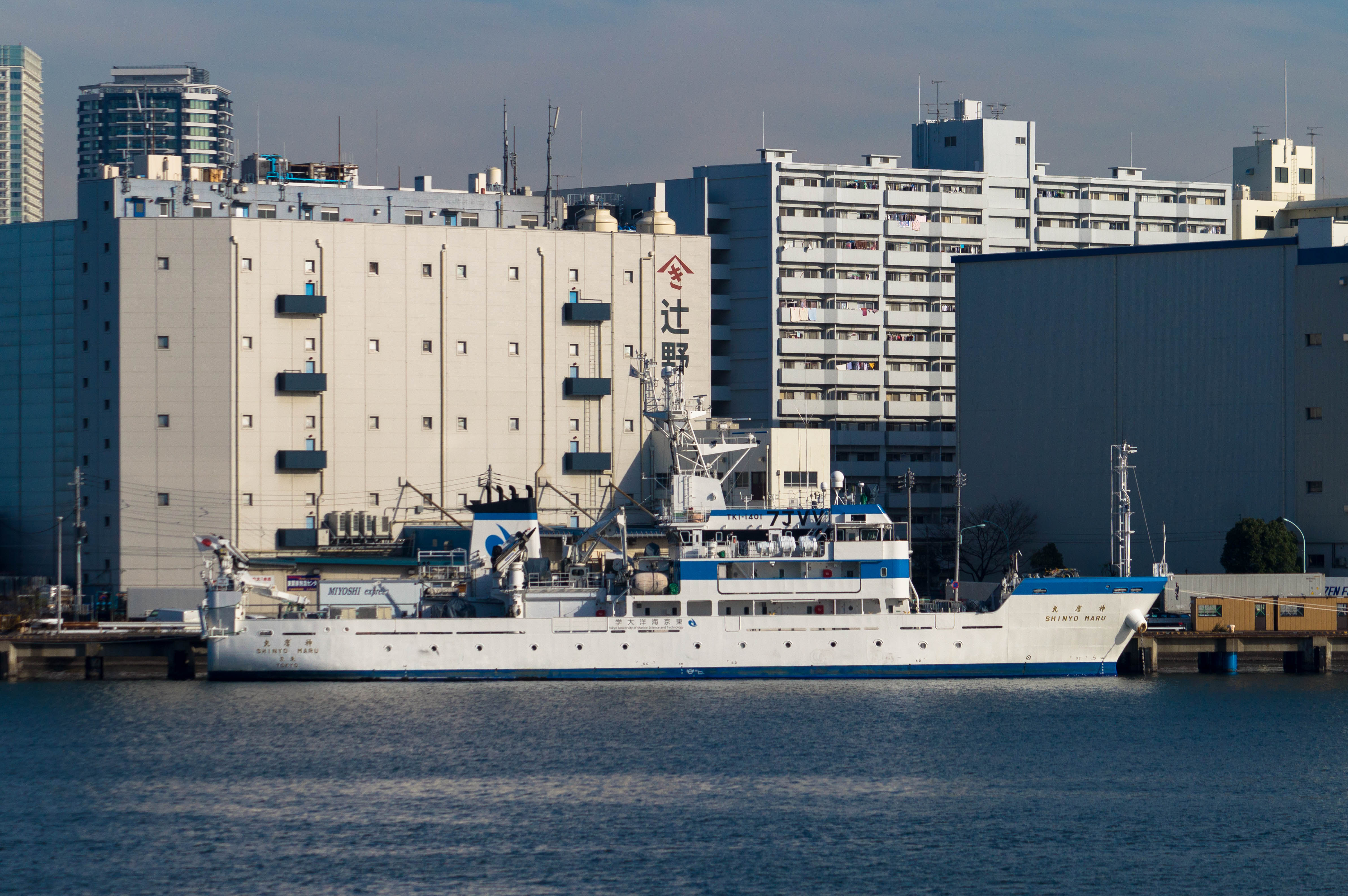 豊海水産埠頭に接岸中の東京海洋大学の練習船「神鷹丸 (4代)」、2016年12月19日撮影。